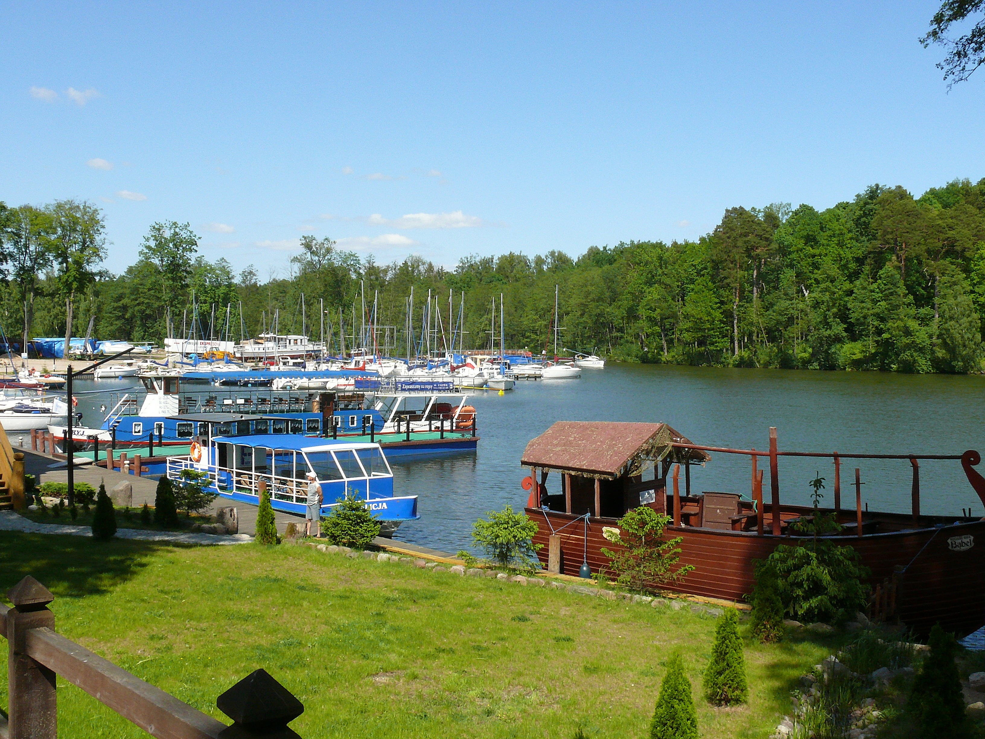 Ruciane Nida - przystań